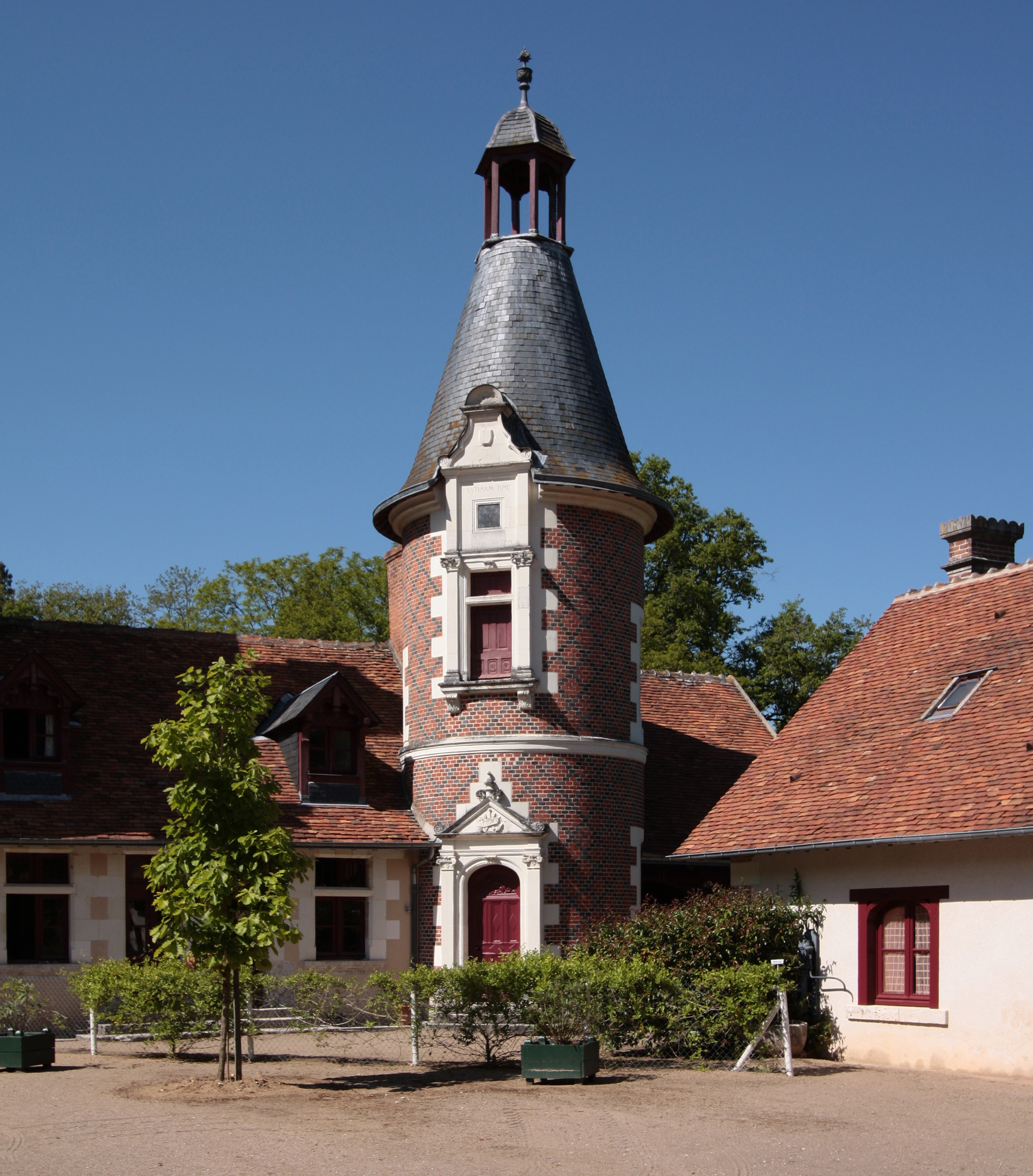 Schloss Troussay, Département Loir-et-Cher/Frankreich - Turm an der rechten Seite der Hauptfassade.